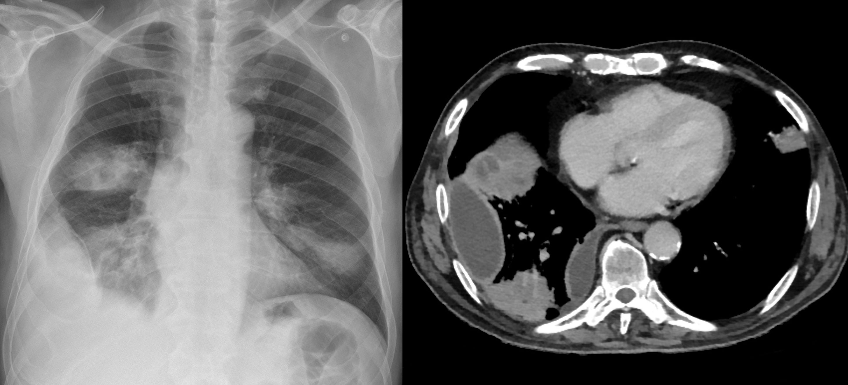 Pulmonale Aktinomykose mit Actinomyces meyeri bei einem 67-jährigen im Röntgenbild und in der Computertomographie. Solide, eine maligne Neoplasie imitierende Formationen in beiden Lungen mit Kavernisierung und Pleuraempyem.